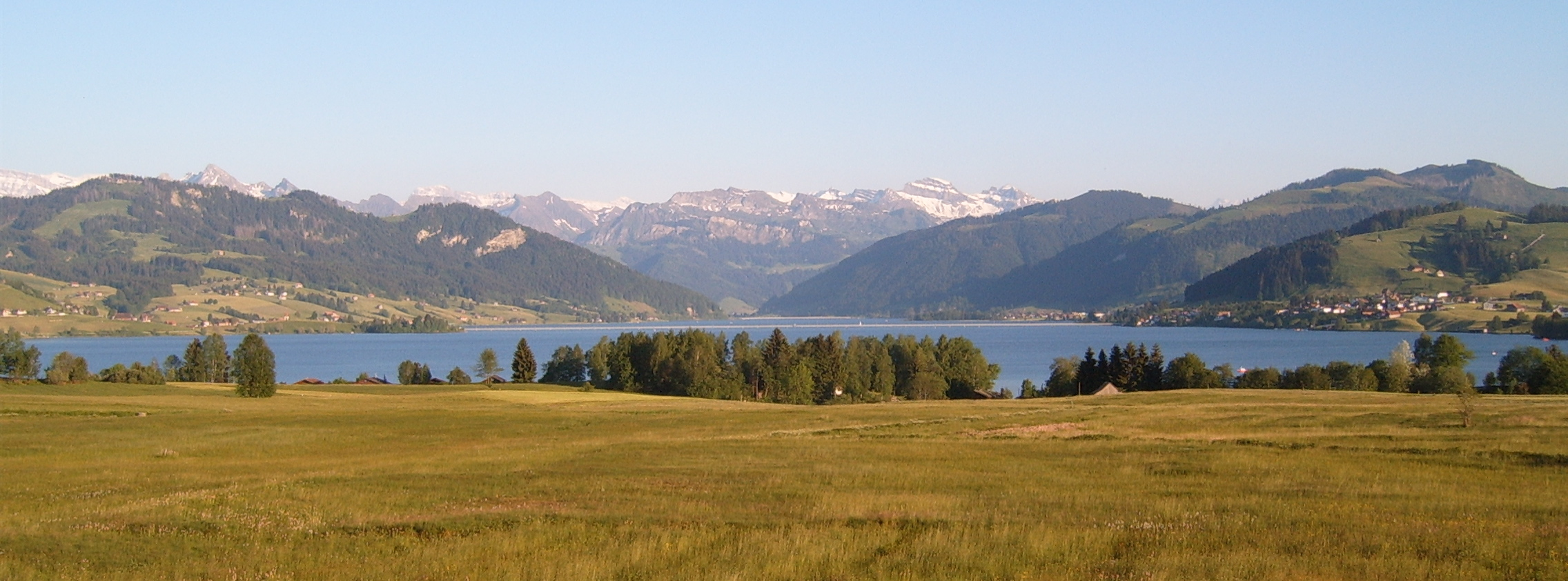 Sihlsee, Canton of Schwyz (Switzerland)